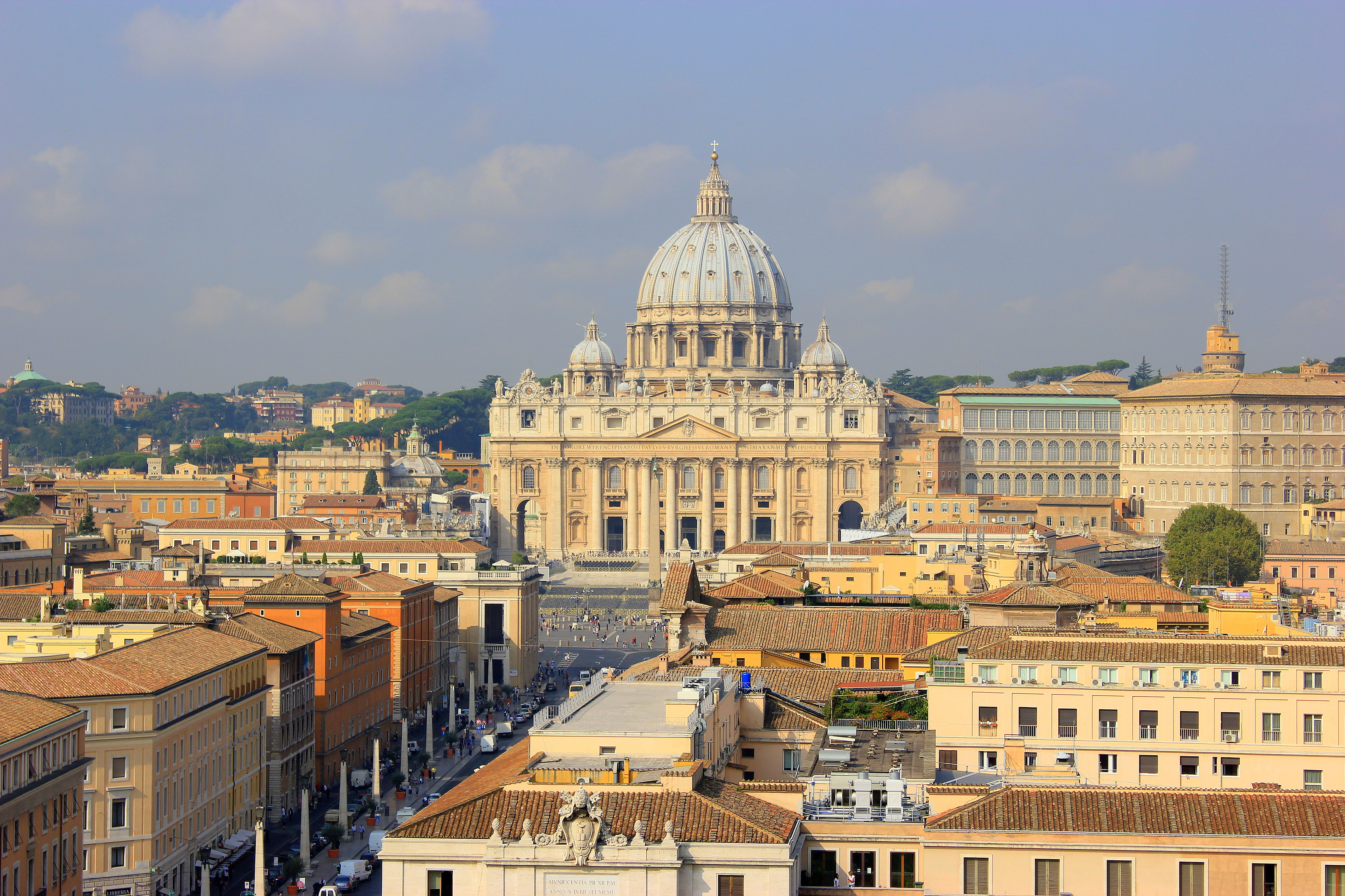 Vista desde Castel Sant'Angelo